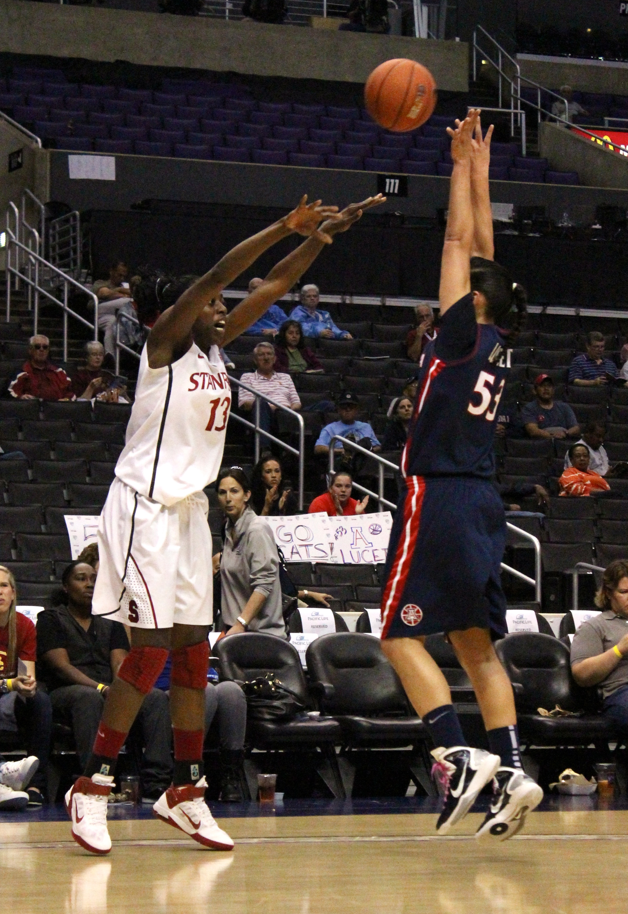 La basketteuse de Stanford Chiney Ogwumike effectue une passe lors du Tournoi de la Pac 10